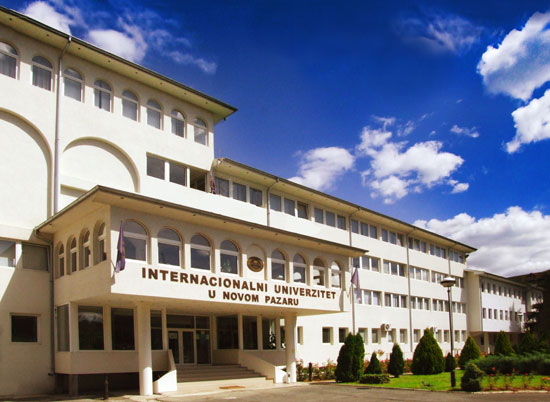 Zgrada Univerziteta u Novom Pazaru, autor je Univerzitet u Novom Pazaru, fotografiju je napravio Univerzitet u Novom Pazaru.